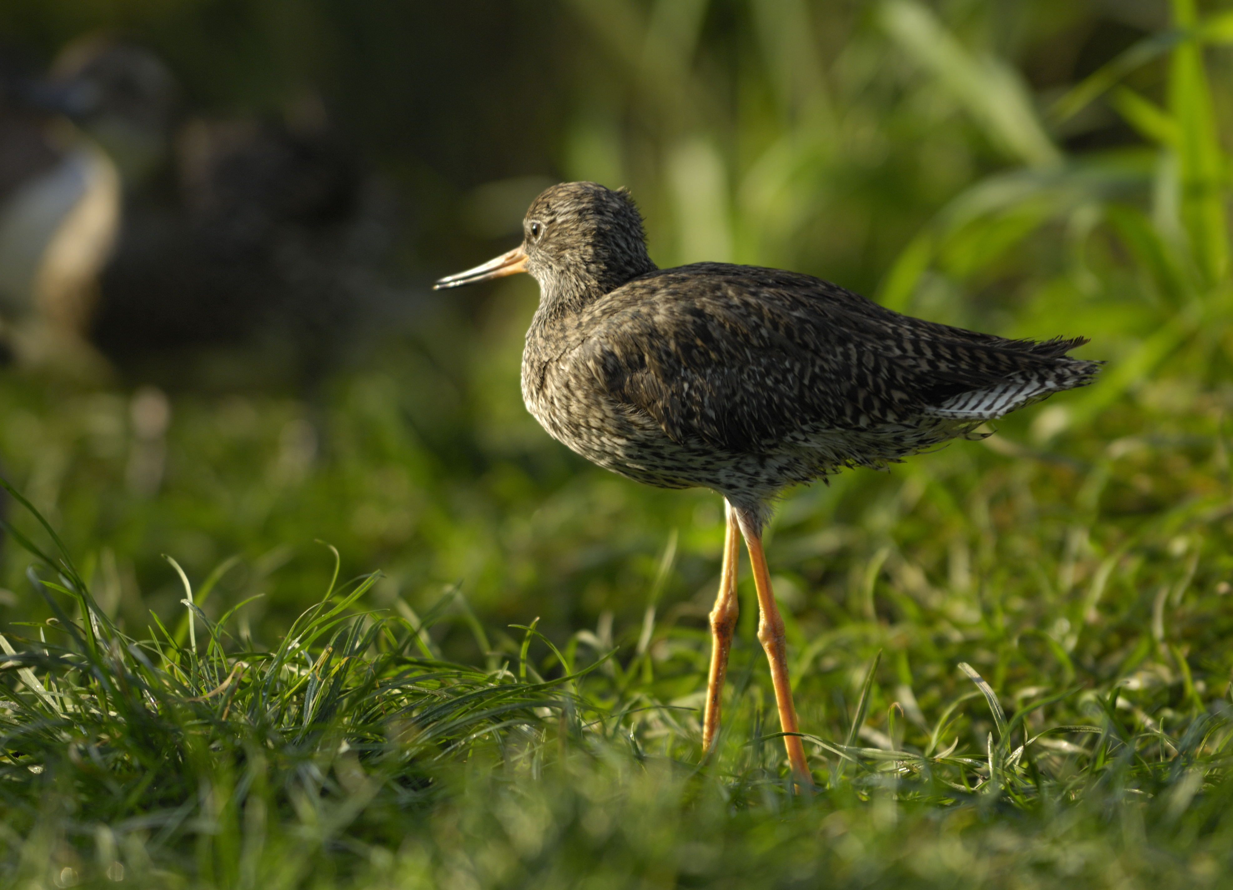 Rotschenkel (Tringa totanus) im Tiergarten Schönbrunn, Wien, Österreich